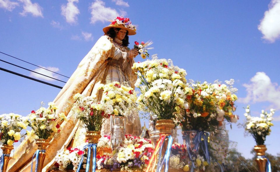 La Imagen en sus andas el día de la procesión.